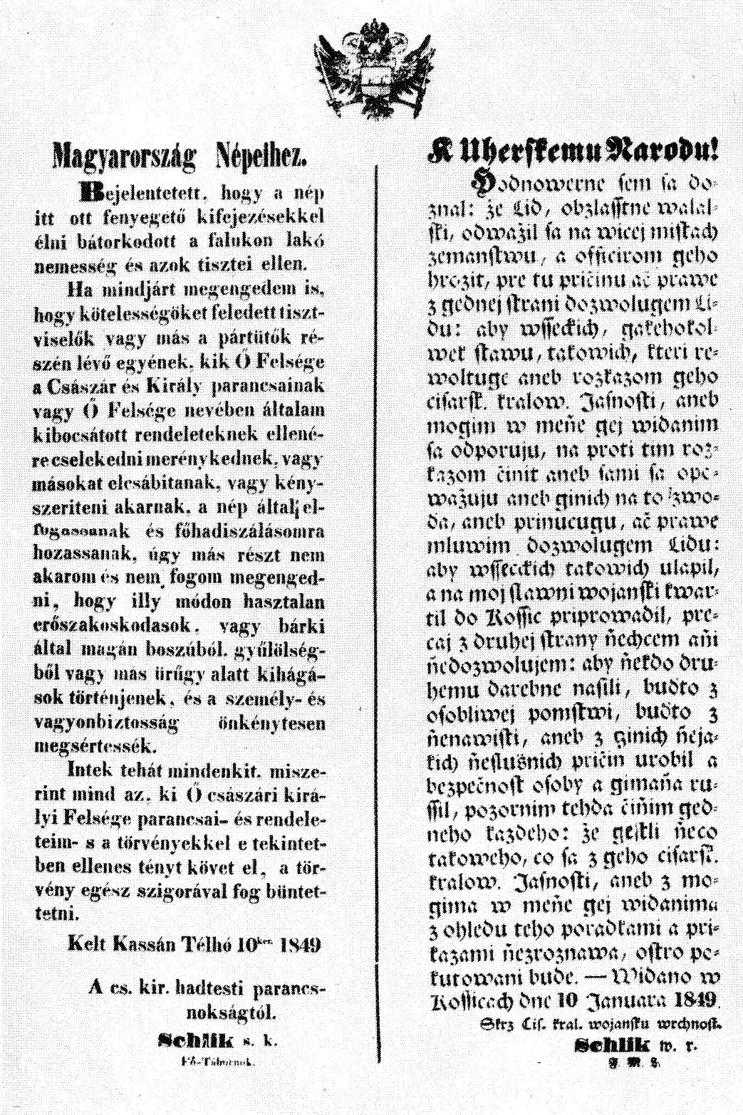 Franz Schlik tábornok 1848. december 10-én kelt magyar és szlovák nyelvű hirdetménye